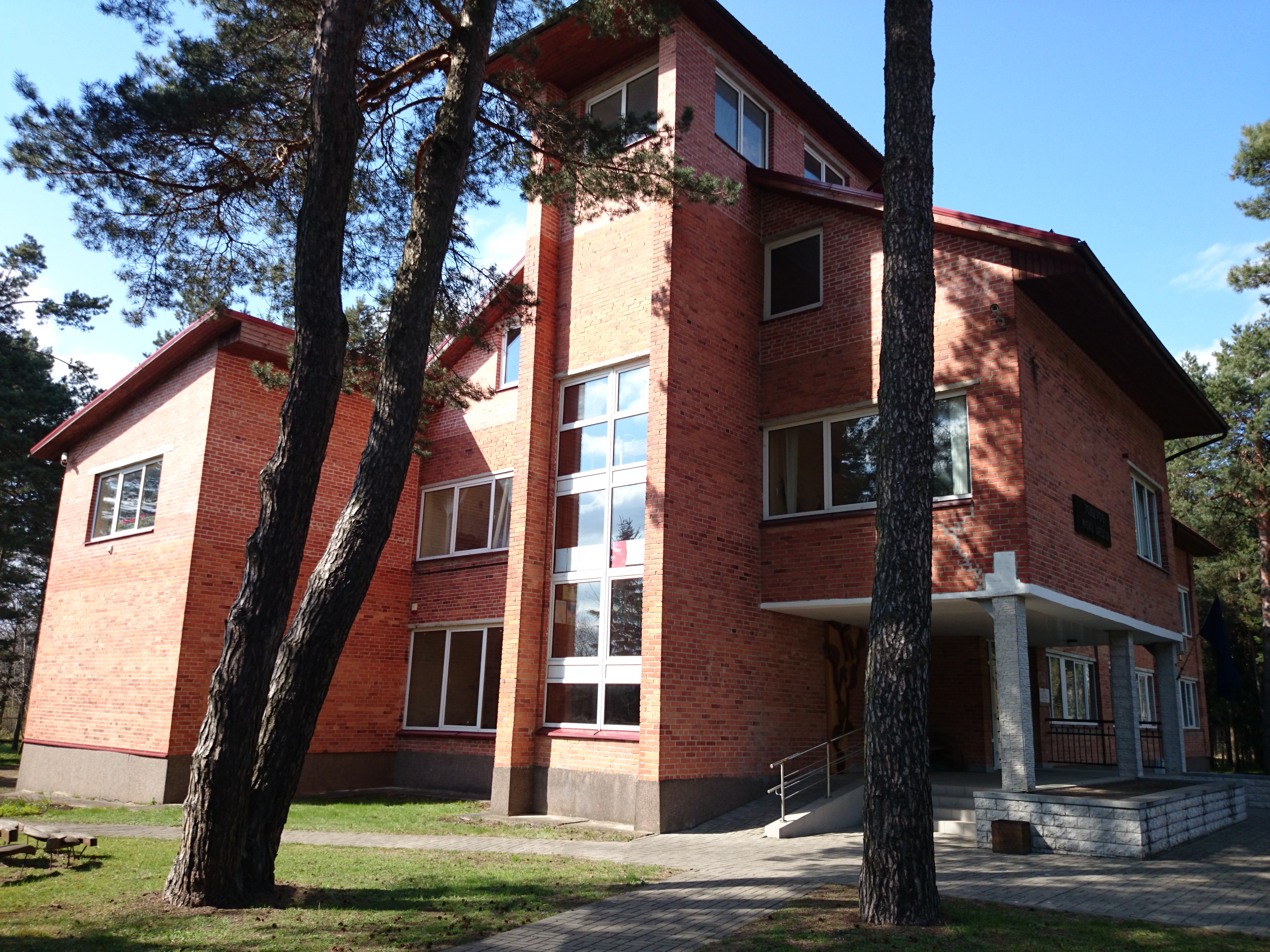 Jonava Forestry